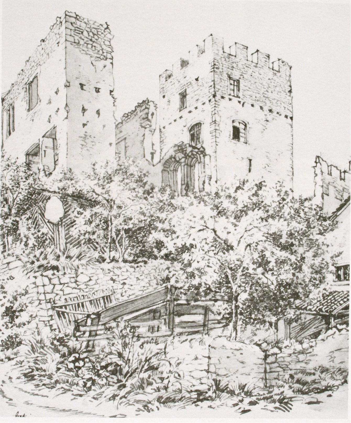 Schloss Brandis um 1900; Zeichnung von J. R. Rahn